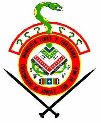 Escudo del municipio de Chiconcuc